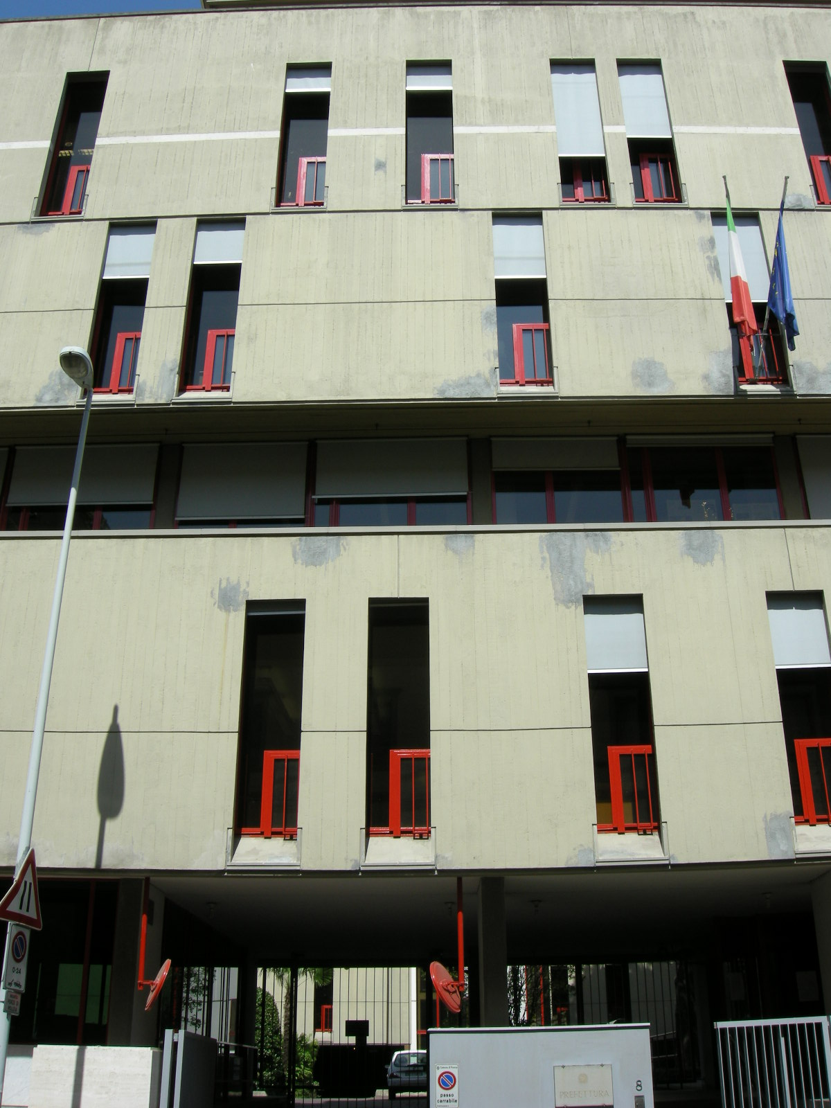 Ex sede della nuova italia